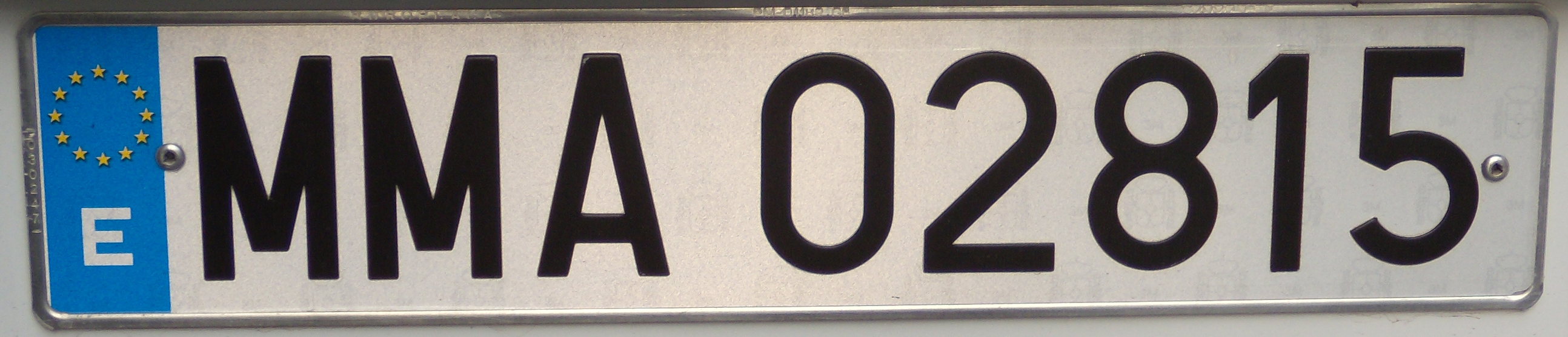 Placa mineralógica española, Ministerio de Medio Ambiente